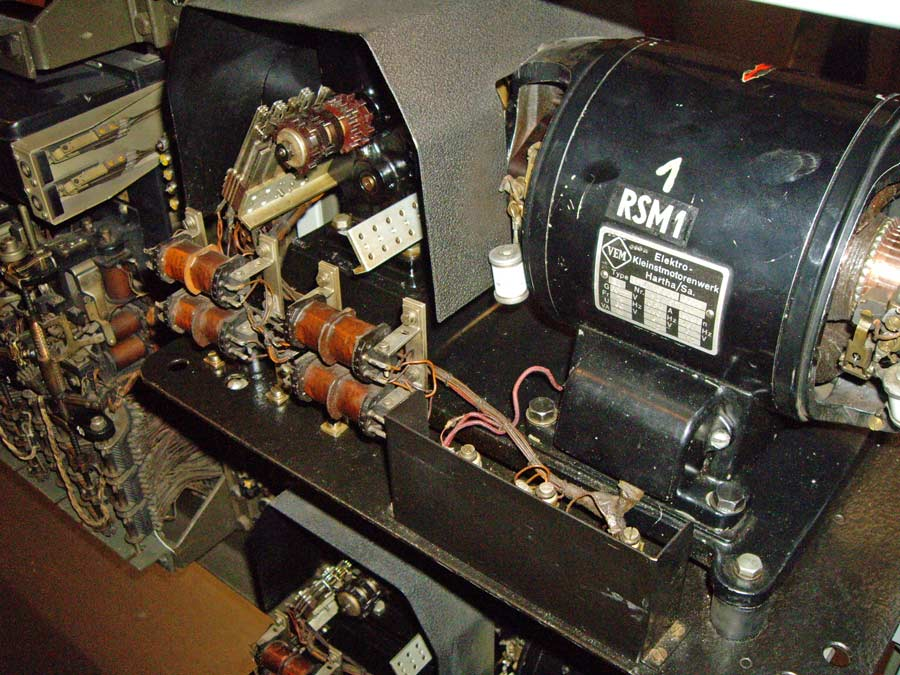 Ruf- und Signalmaschine